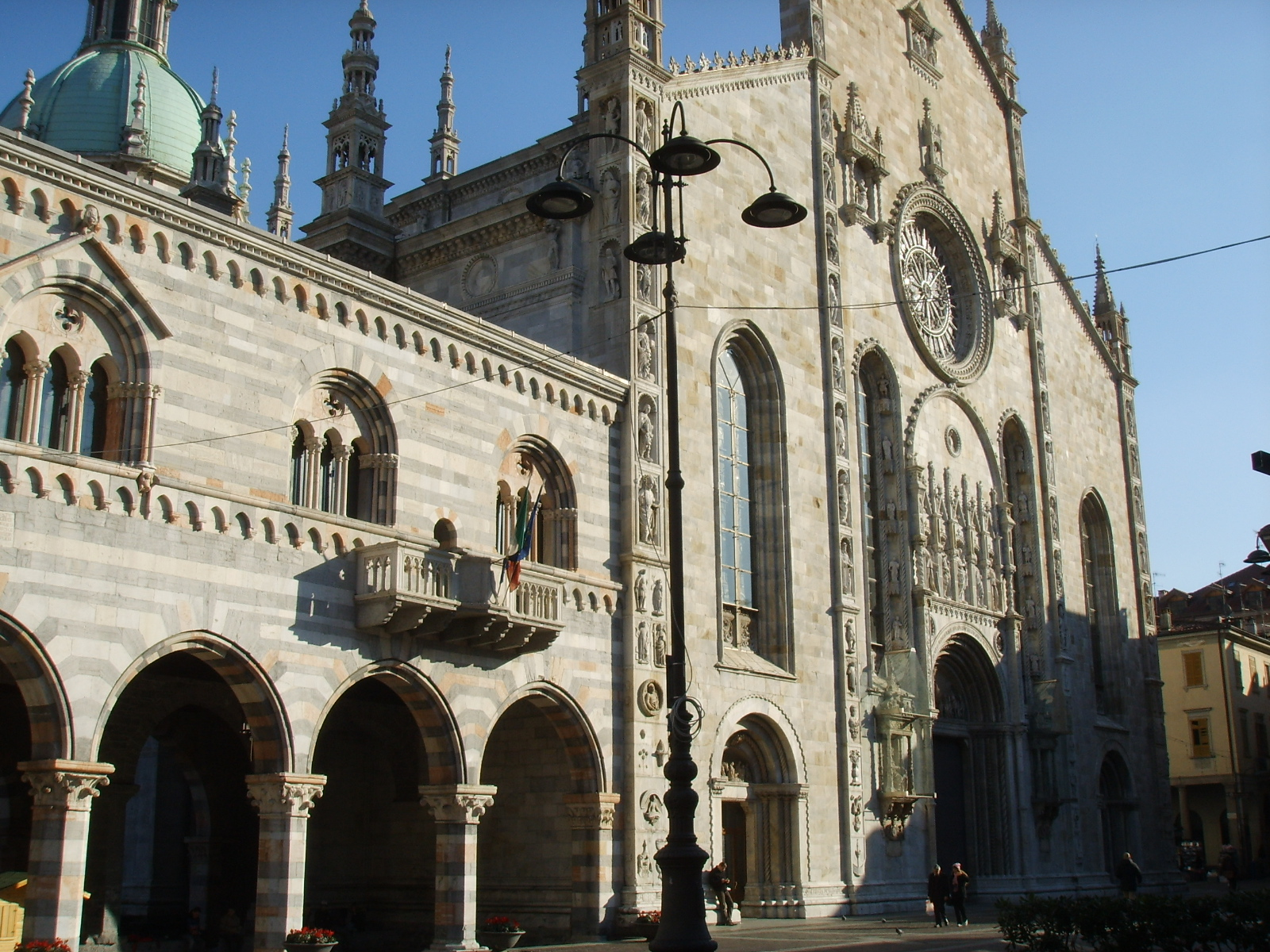 Il Duomo di Como con il Broletto. 1870s. Today.